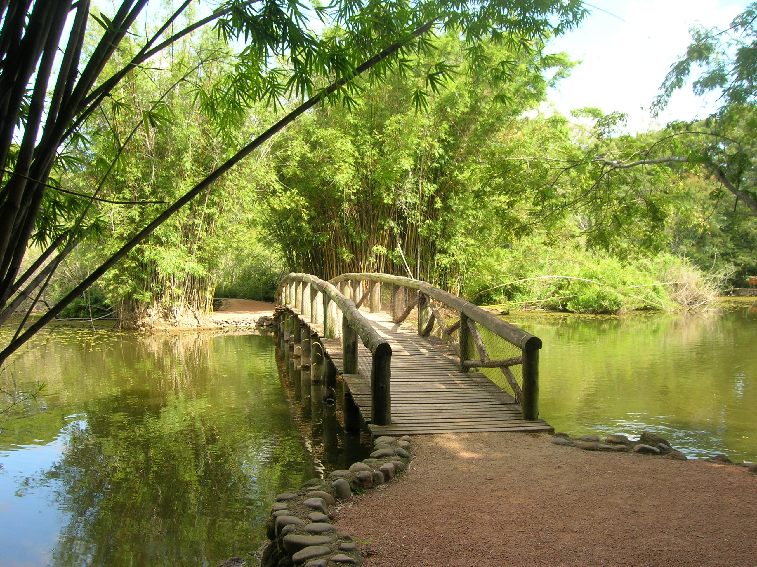 Ponte de um dos lagos do Jardim Botânico de Porto Alegre.